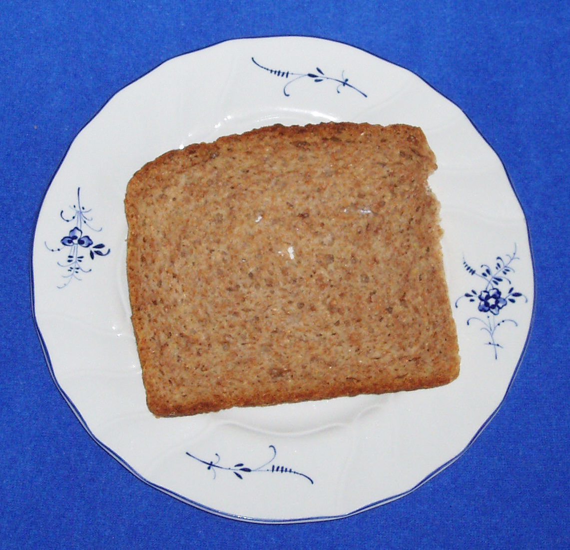 Grahambrot